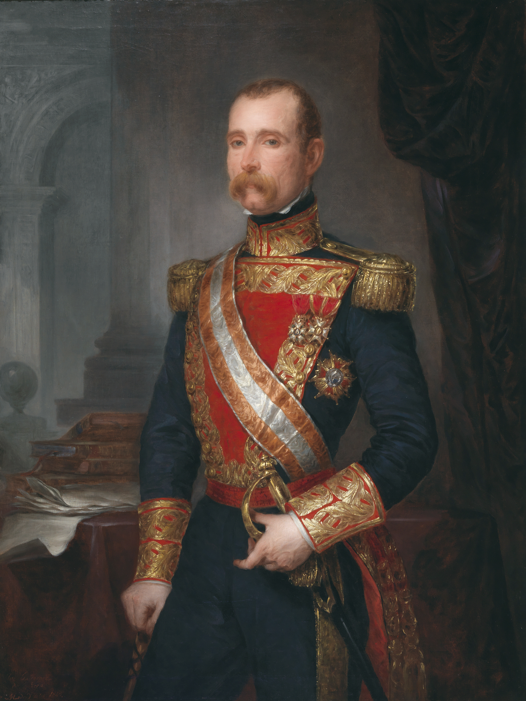 Retrato del escritor y militar español Antonio Ros de Olano (1808-1886), que llegó a ser general del ejército español. El lienzo fue adquirido por el Museo del Prado en 1866.